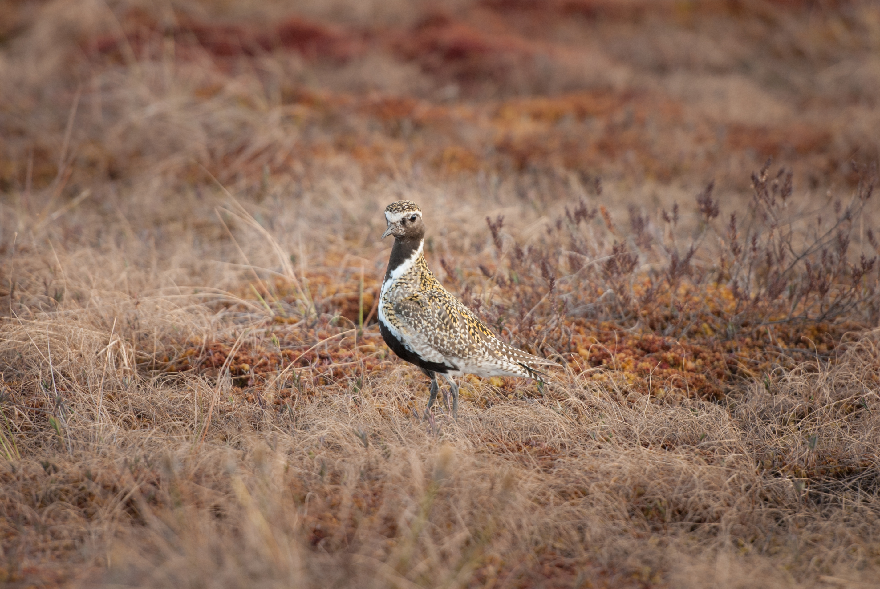 Rüüt Kakerdaja rabas